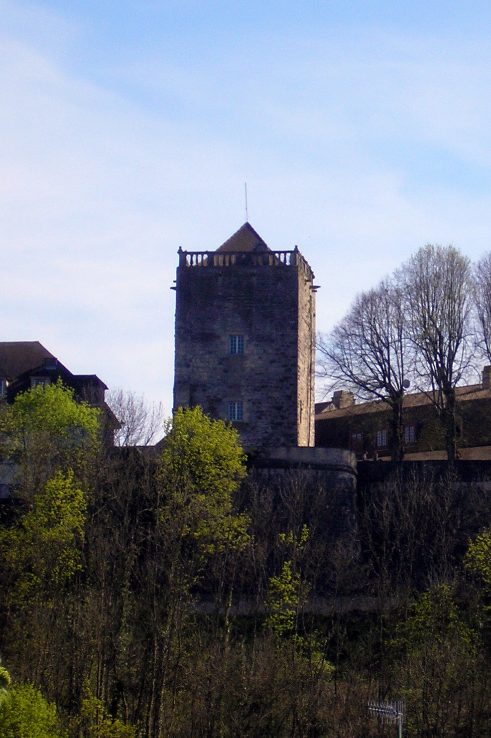 Le Donjon de Chaumont (52)